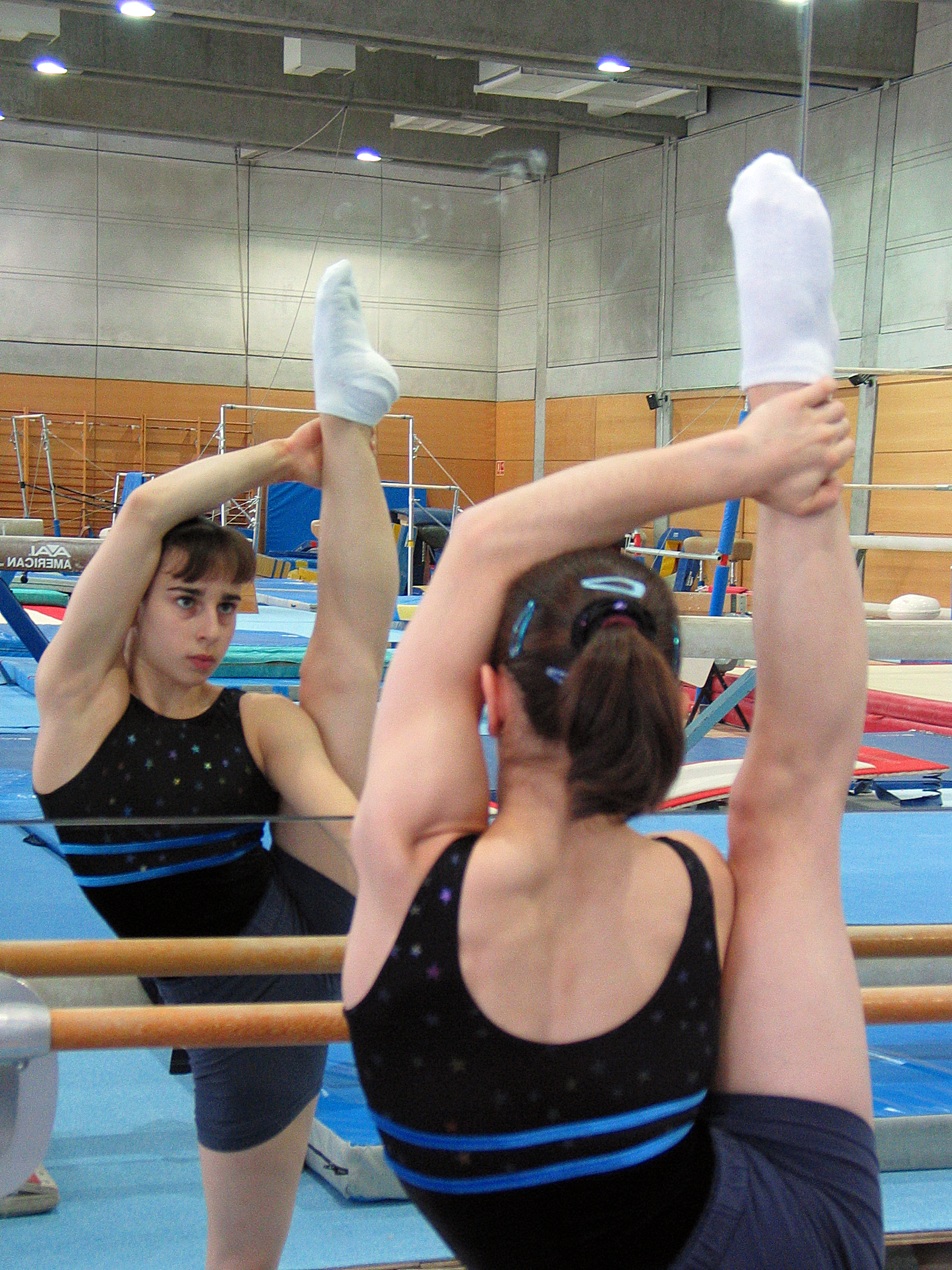 Lenika de Simone en el CAR de Madrid el 20 de octubre de 2003.